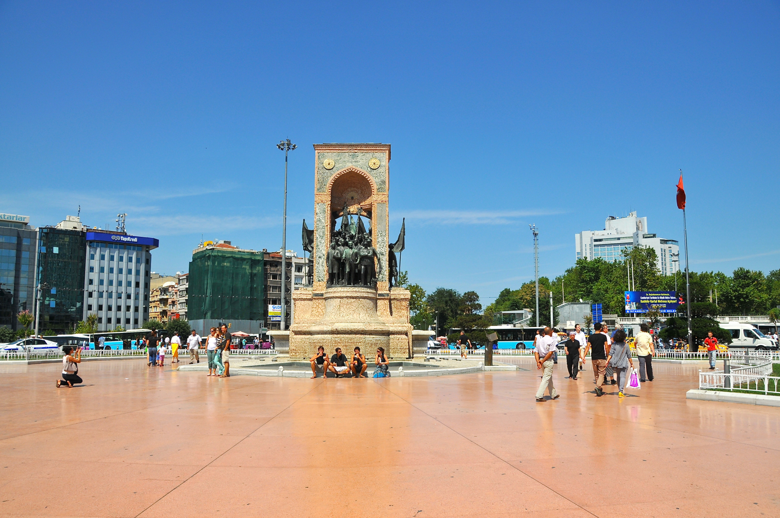 Taksimplein. Plein waar het gebeurt, het Malieveld, het Museumplein van Istanbul. Het plein strekt zich overigens nog aan alle kanten uit. In het midden van het plein staat het Cumhuriyet Aniti-standbeeld. Dit 11 meter grote standbeeld, gemaakt door de Italiaan Pietro Canonica, staat symbool voor de republiek Turkije.